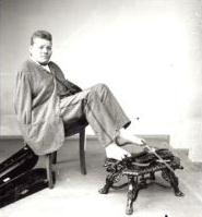 Der armlose Künstler Carl Herrmann Unthan (1848-1929) beim Spiel einer Violine, aufgenommen 1885